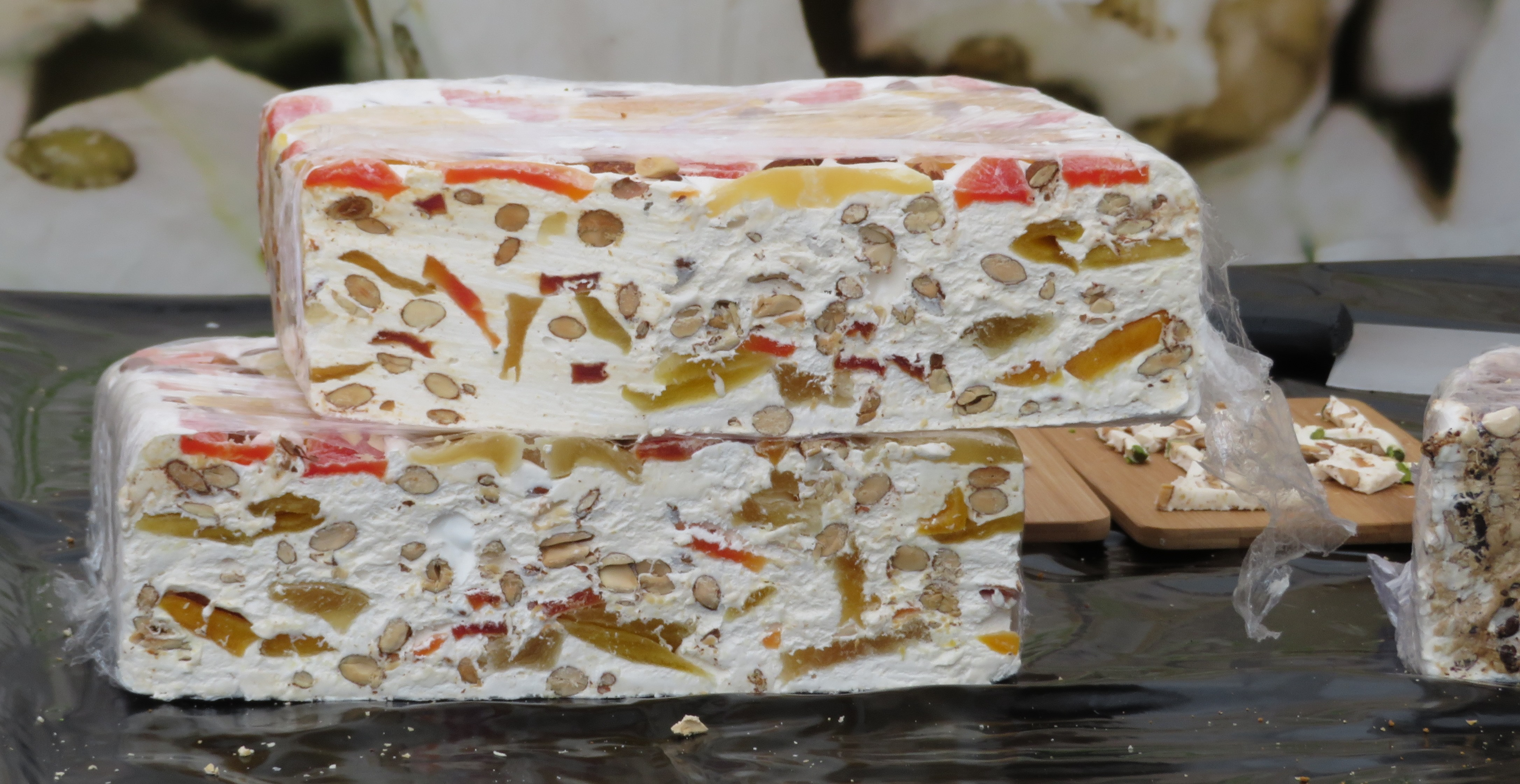 12. Internationales Orgelfest Waldkirch, französischer Markt